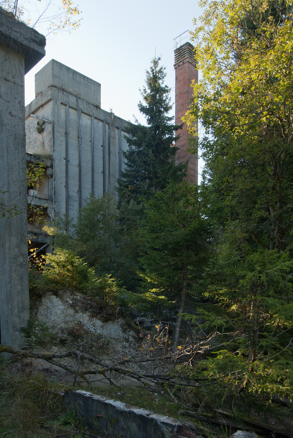 Rolava, Krušné hory, zbytky úpravny cínové rudy; více